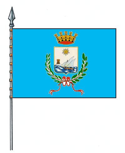 Bandiera del Comune di Camogli, Liguria, Italia